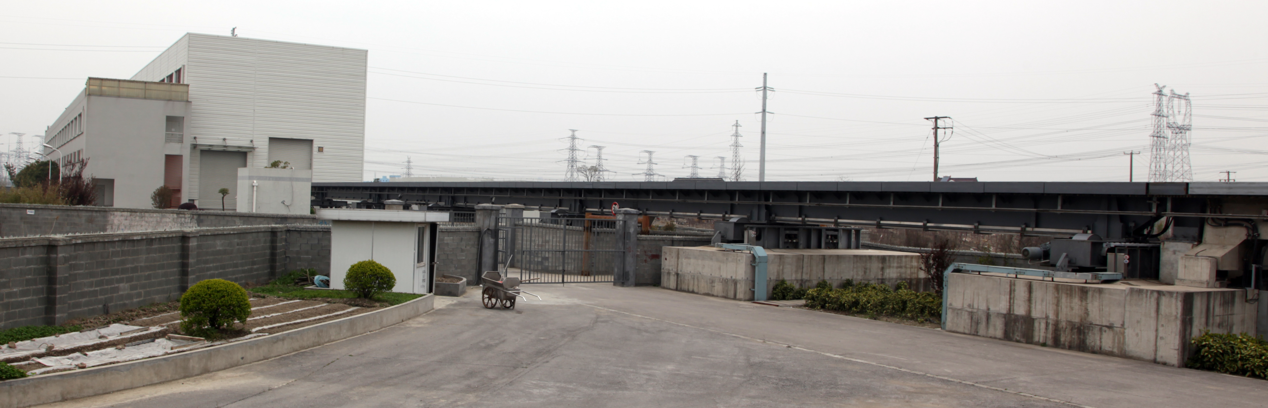 Wartungshalle für die Magnetschwebebahn auf der Teststrecke der Tongji-Universität, Jiading Campus. Rechts im Bild die vor der Halle befindliche Weiche.